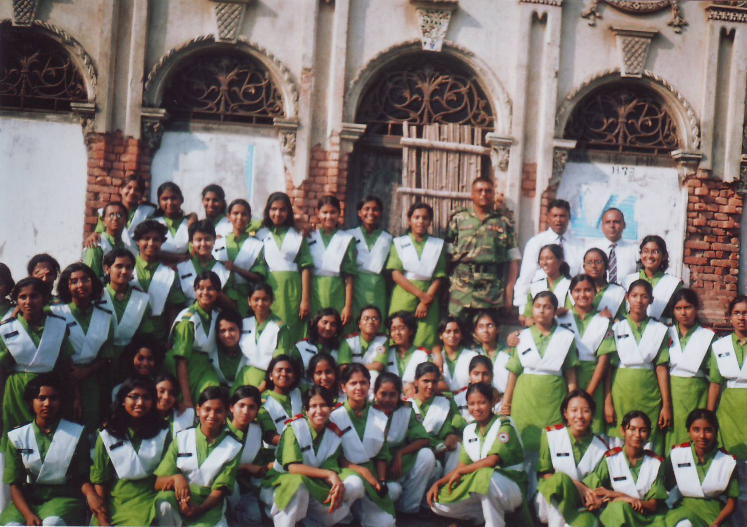 outing at panam city at sonargan